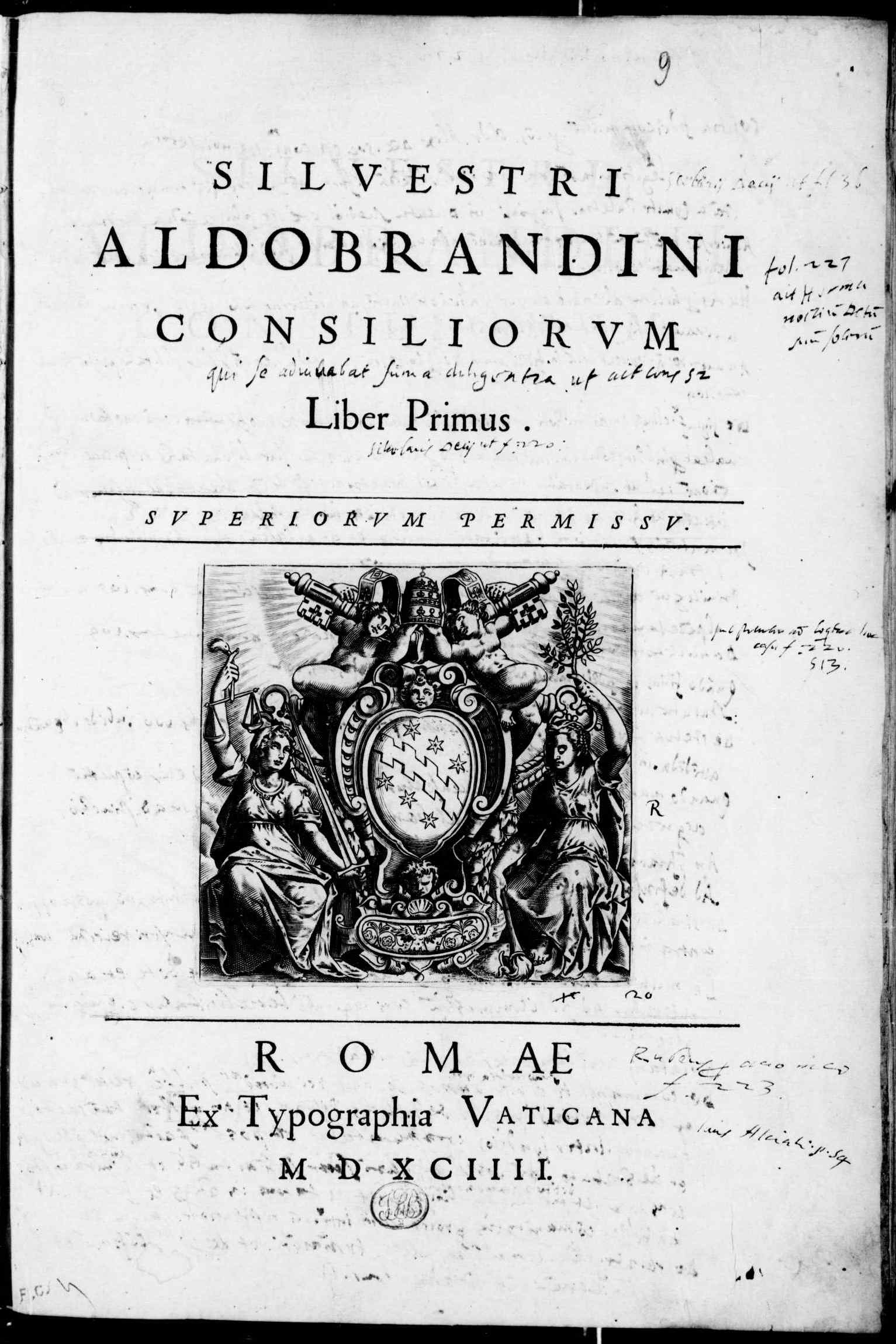 Frontespizio